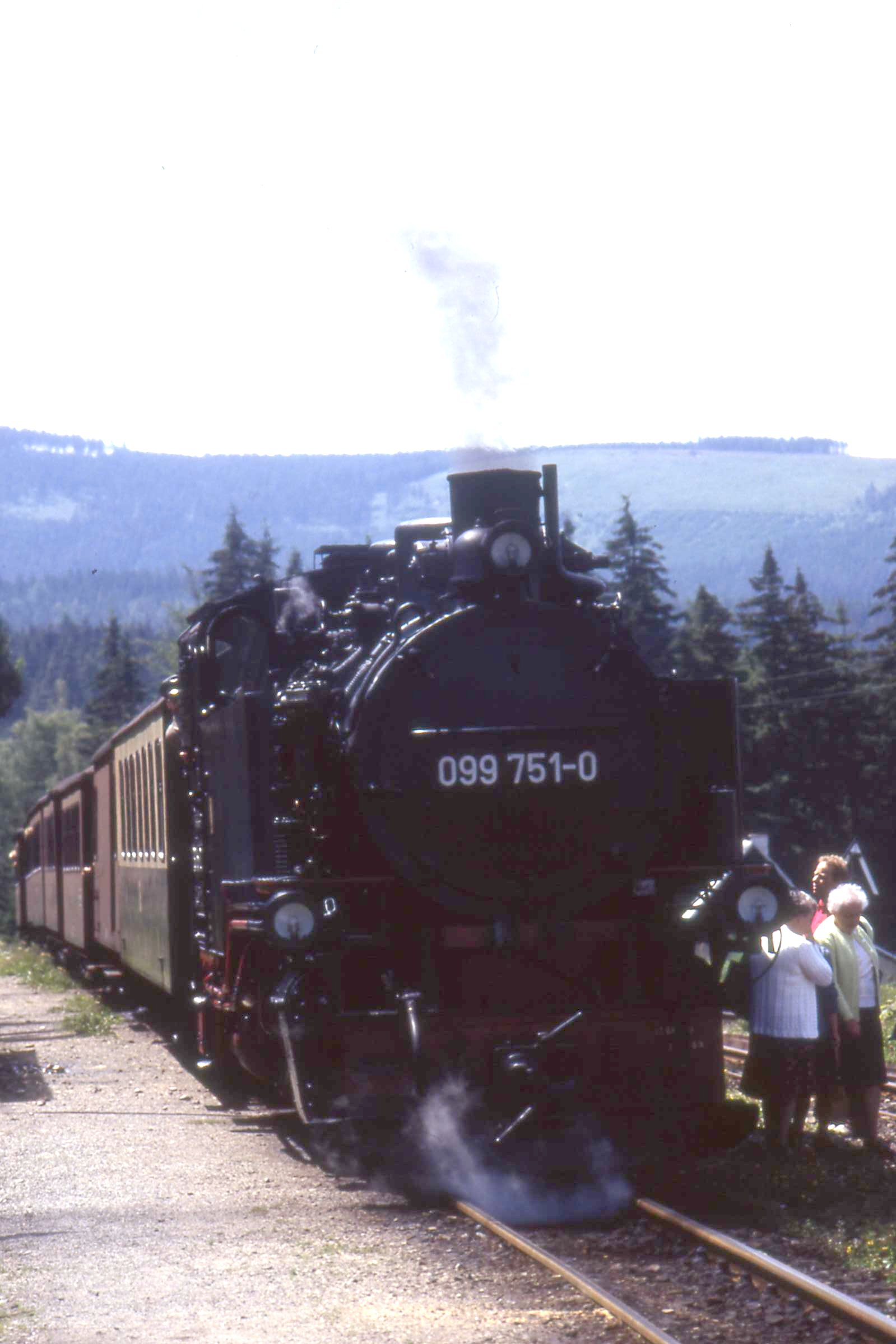 Kretscham -Rothensehma Zug mit Lok 099 751-0, Aug 1992